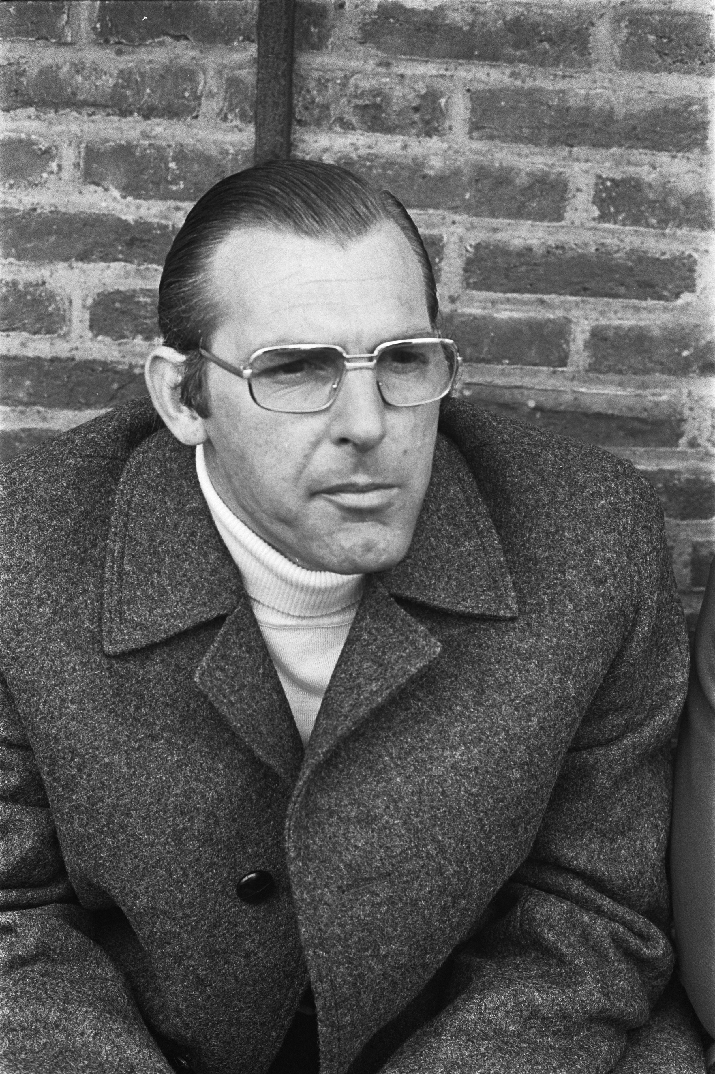 Photographie de l'entraîneur du MVV Leo Canjels par Bert Verhoeff / Anefo (Eindhoven, 1973).